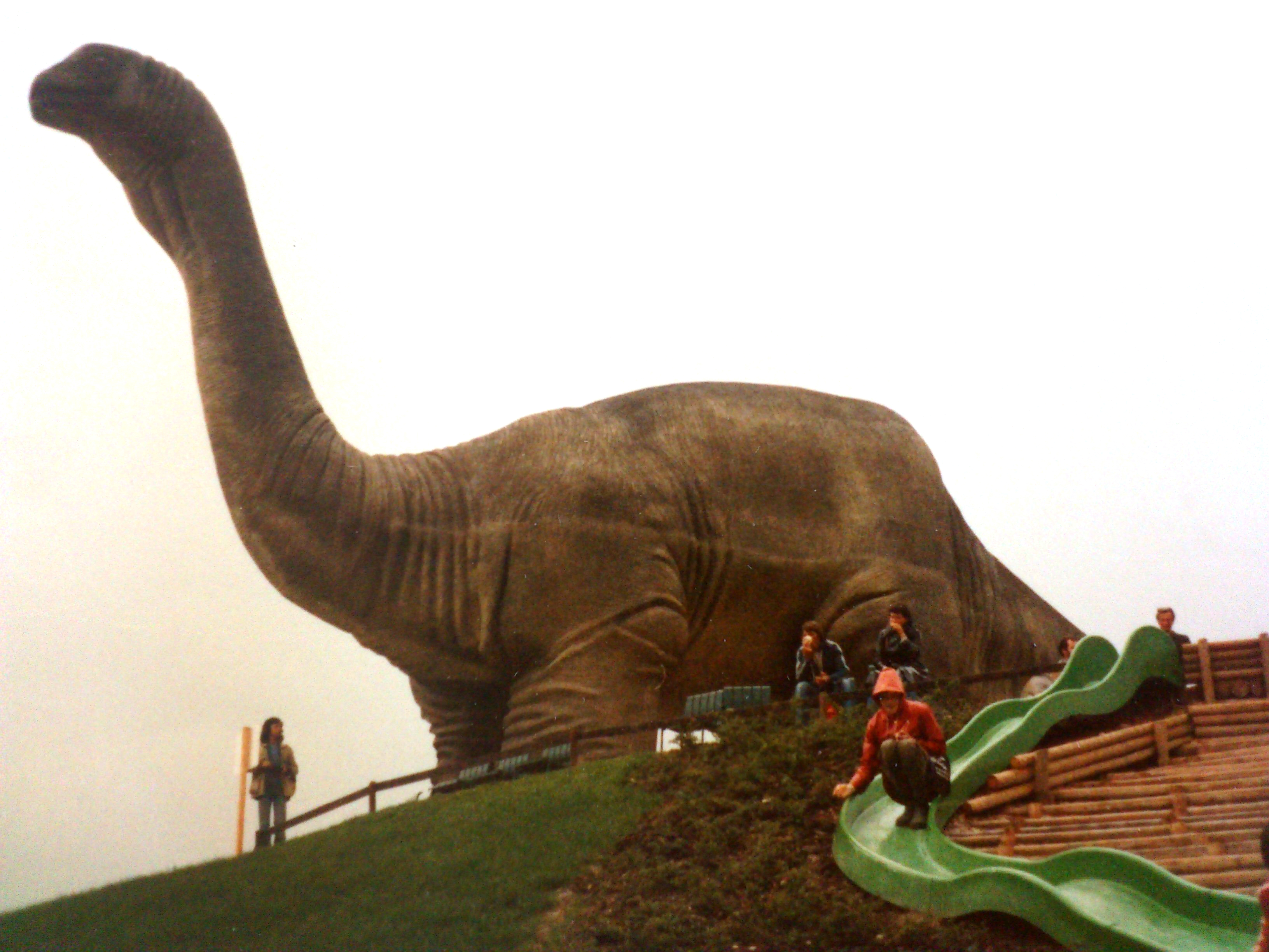 Dinosaurier-Nachbildung aus Beton anlässlich der "Grün 80", der 2. Schweizerischen Ausstellung für Garten- und Landschaftsbau 1980 bei Basel. (Reproduktion eines analogen Papierabzuges.)